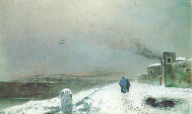 Foto - Nevi Romane- quadro Macchiaiolo di Vincenzo Cabianca (1893)